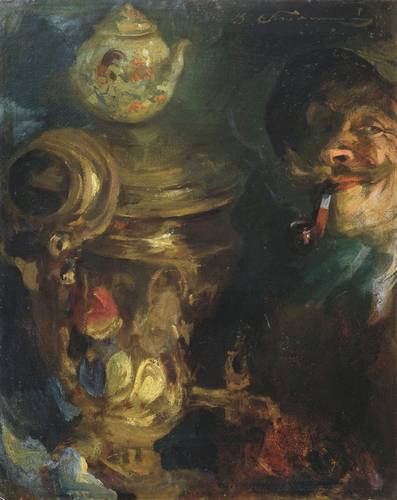 Автопортрет у самовара. 1920-е Холст, масло Днепропетровский художественный музей